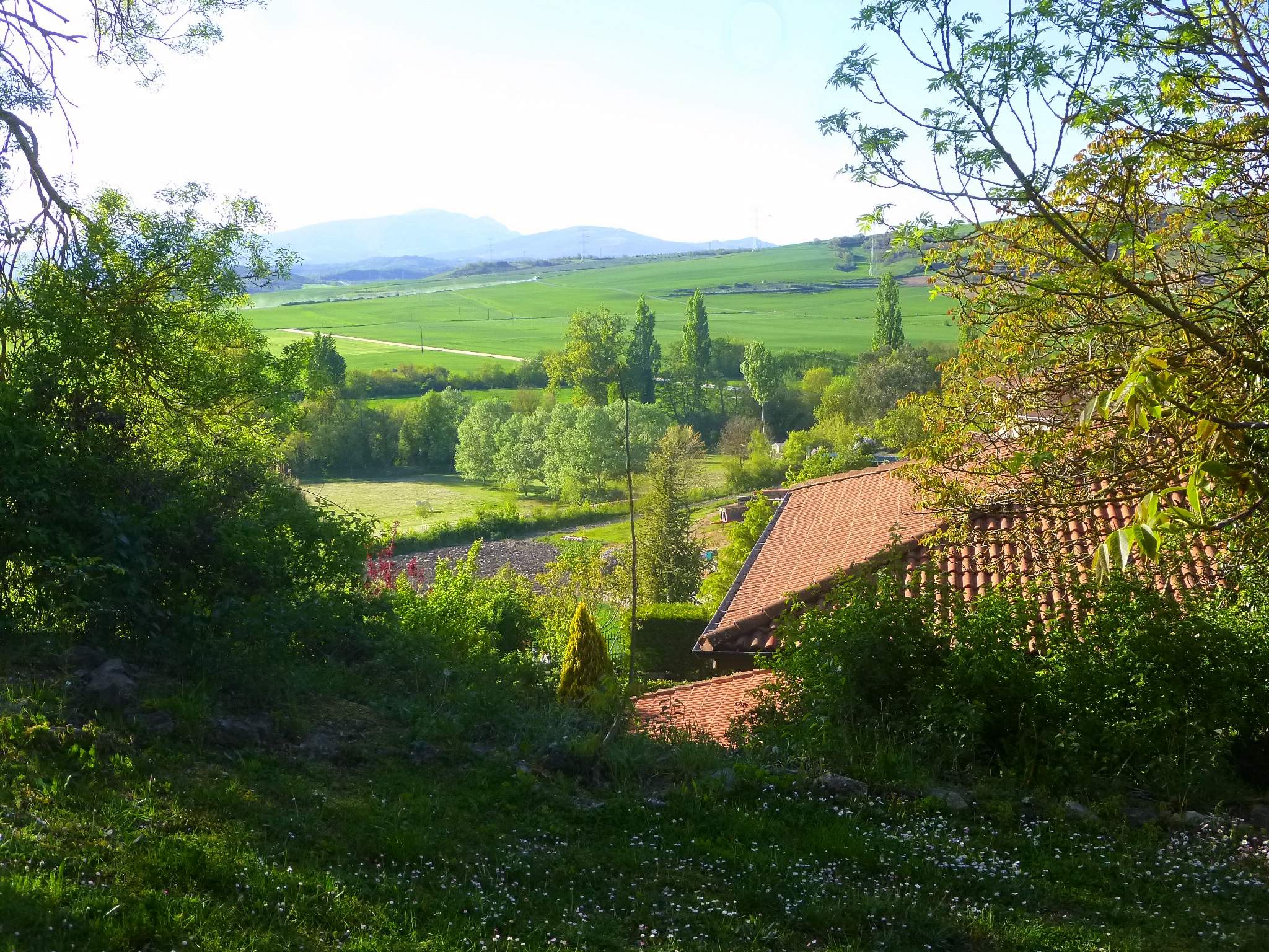 Arroyabe (Álava)